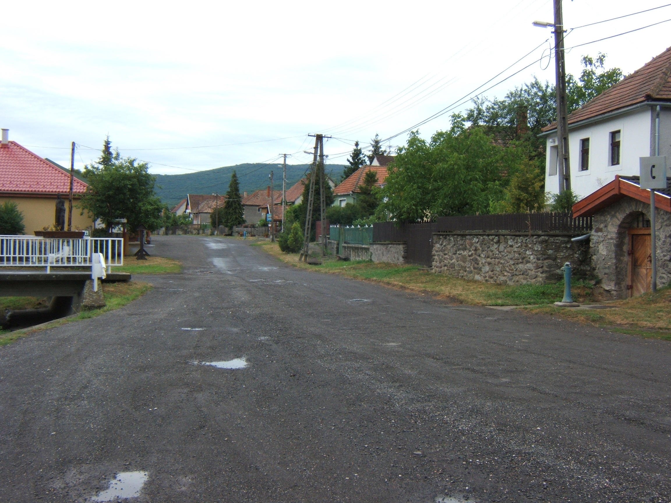 Baskó, utcakép